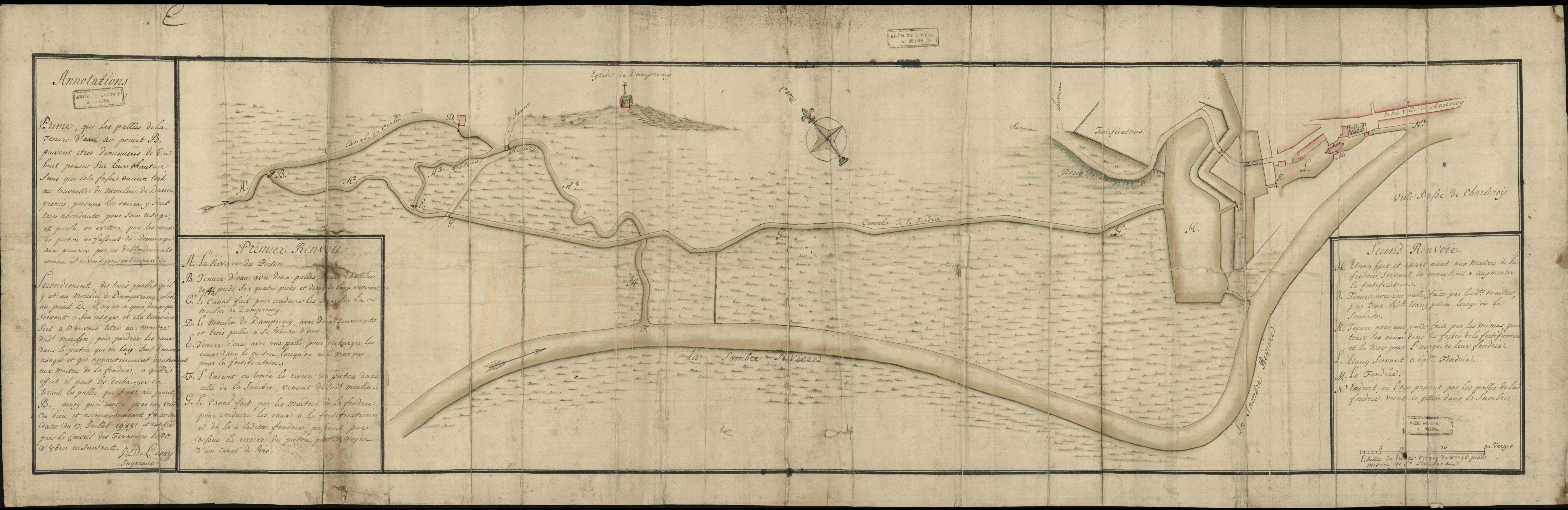 Charleroi (Belgique) - Plan des " tenures d'eau " qui se trouvent à Dampremy, entre la Buchère et Charleroi. Levé en 1688 par J. de Lamy, ingénieur. - Orig., color, avec échelle. – Provenant des Archives de l’État à Namur. Hauteur 30 cm., largeur 92 cm. Un mémoire est joint à ce plan.